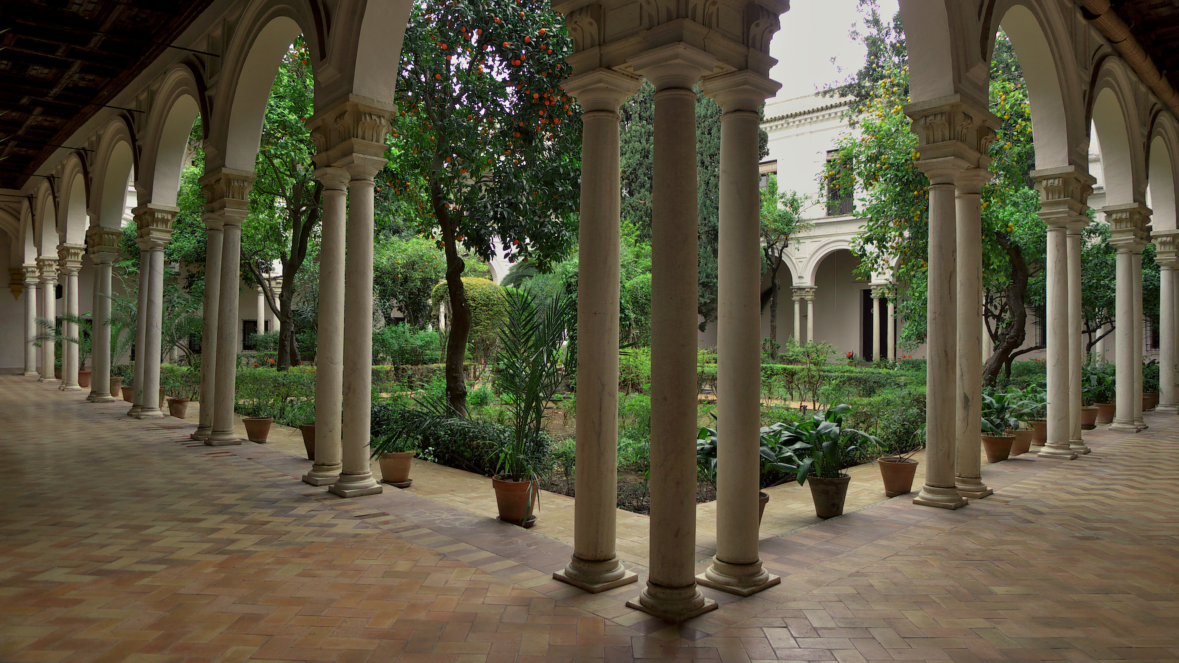 Diego López Bueno y Miguel de Zumárraga proyectaron este gran claustro (1617), arquitectura que sería precedente para otros cenobios sevillanos.